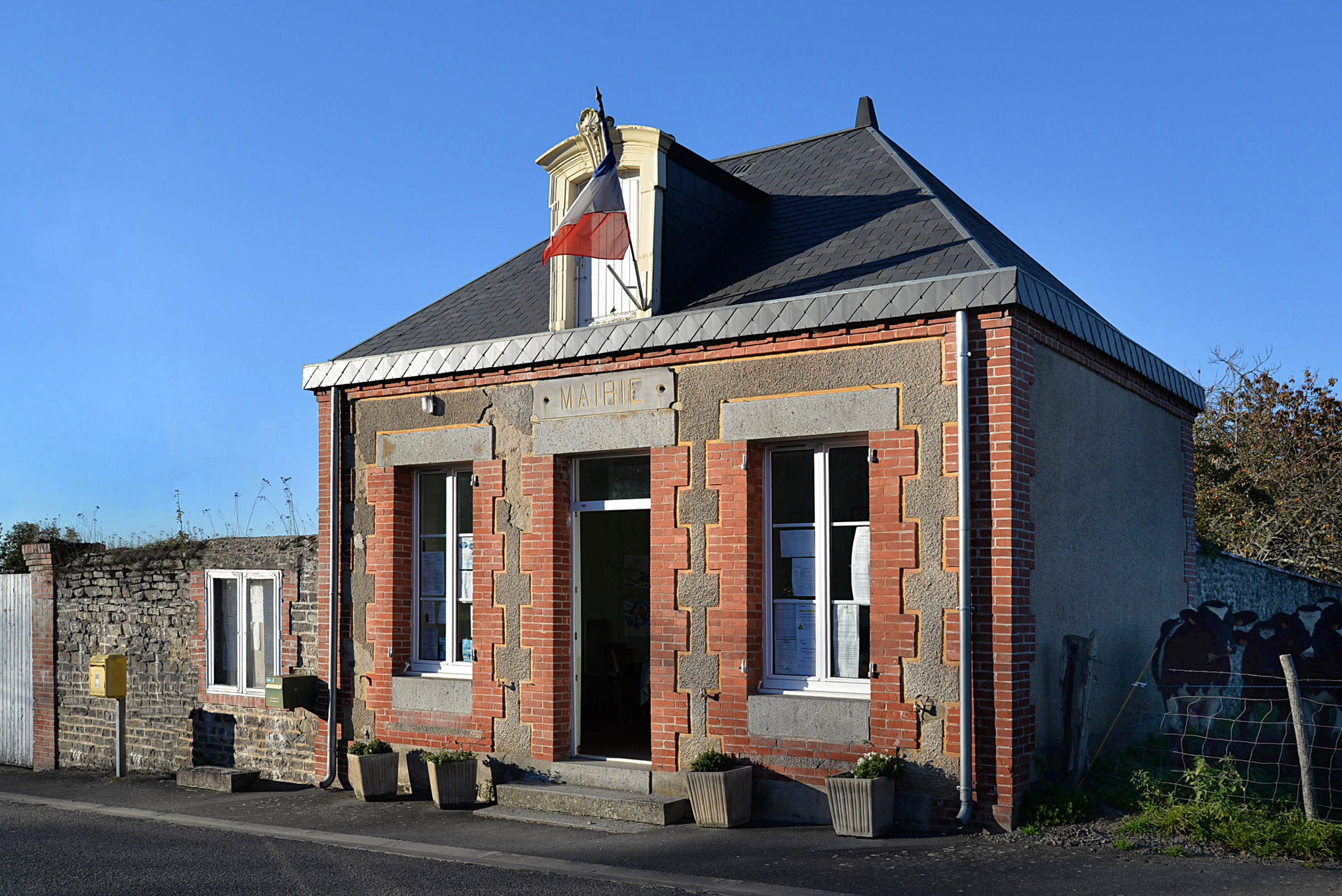 Cossesseville (Calvados)